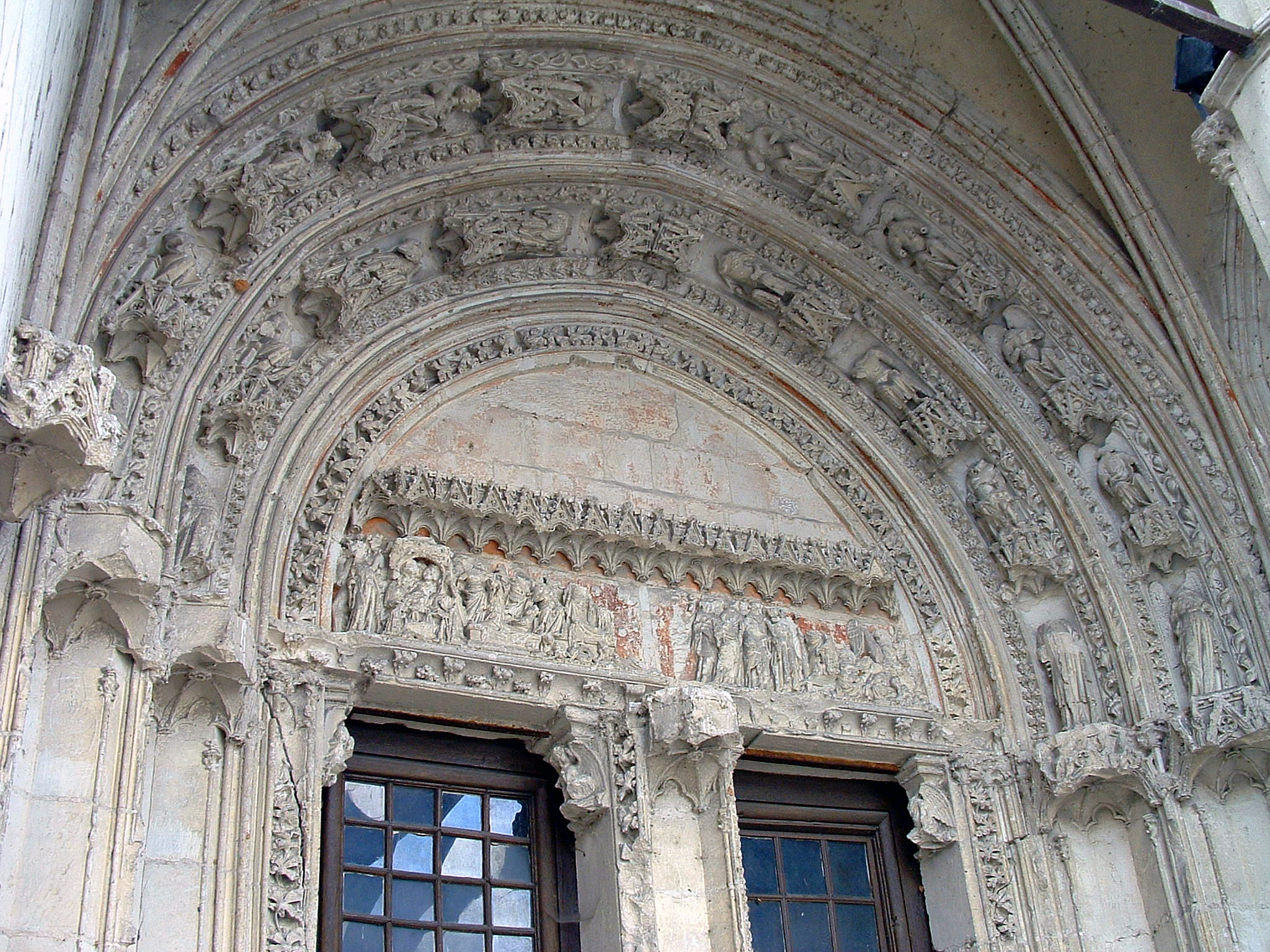 Mézières-en-Brenne - Église Sainte-Marie-Madeleine - Portail - Tympan avec deux rangs d'archivoltes. Le tableau supérieur qui représentait un Jugement dernier a disparu